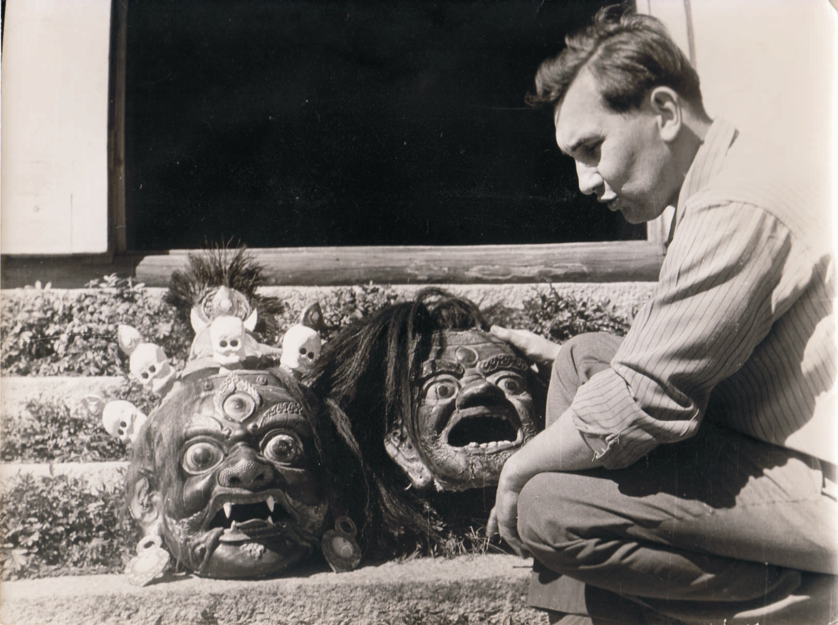 Eberhard Panitz vor einem mongolischen Kloster auf einer Studienreise durch die Mongolei im Jahr 1966.